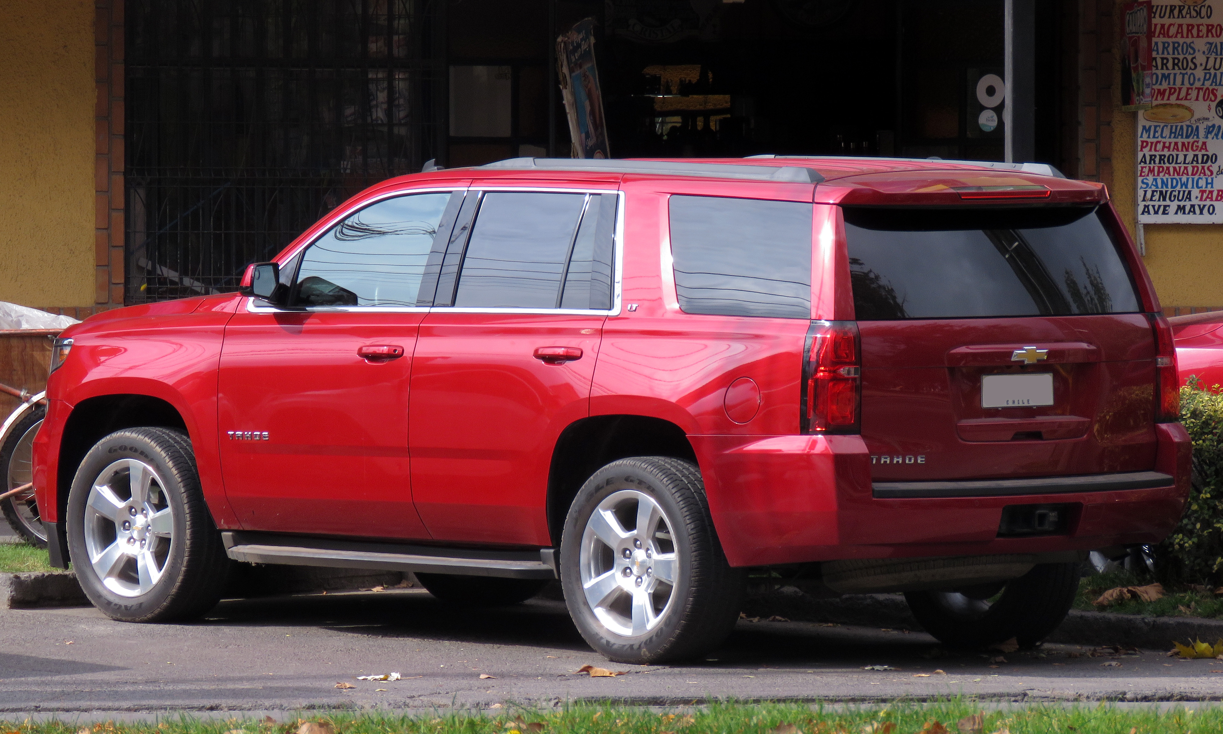 Chevrolet Tahoe LT 2016